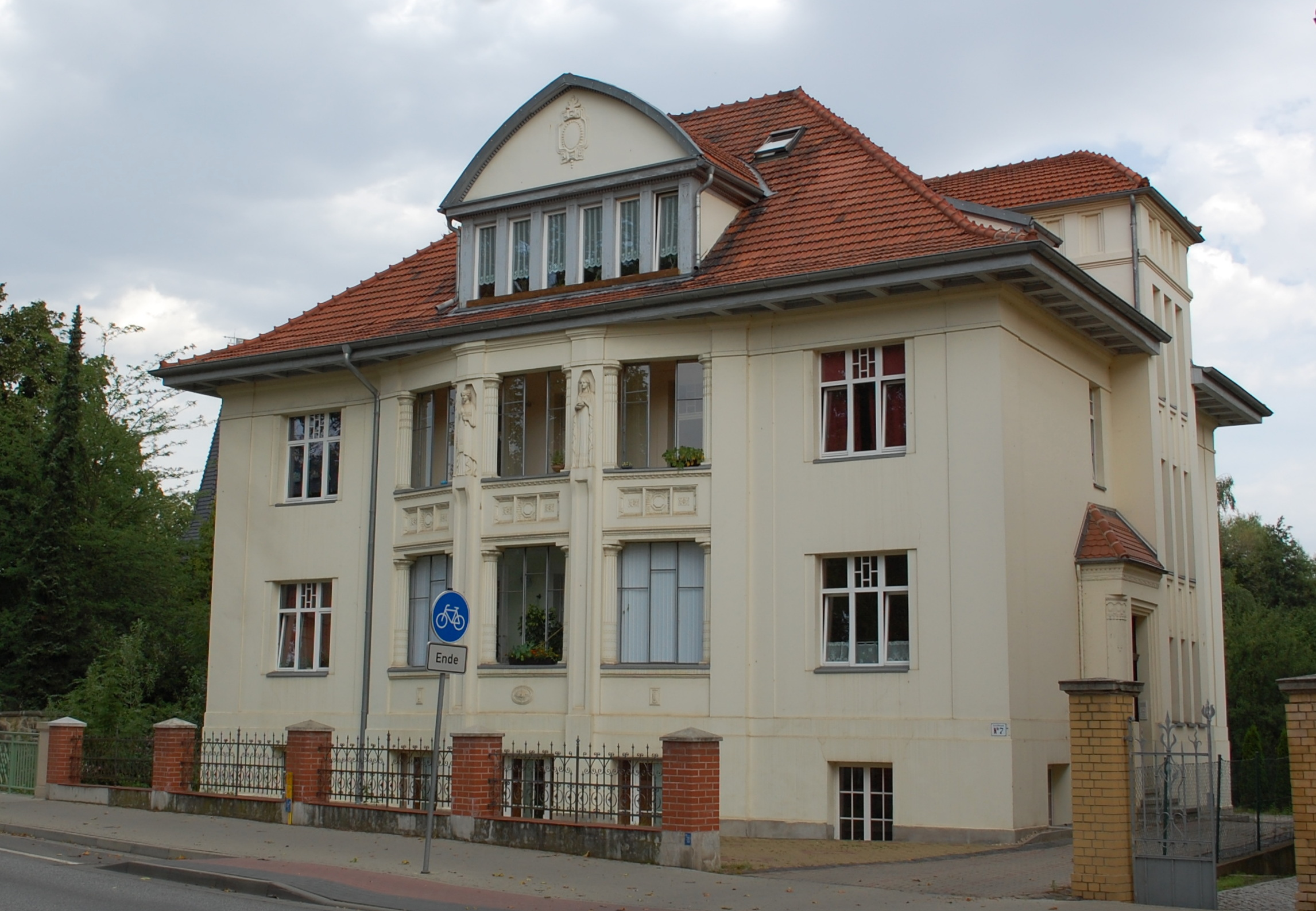 Haus Am Schiff Bleek 7 in Quedlinburg